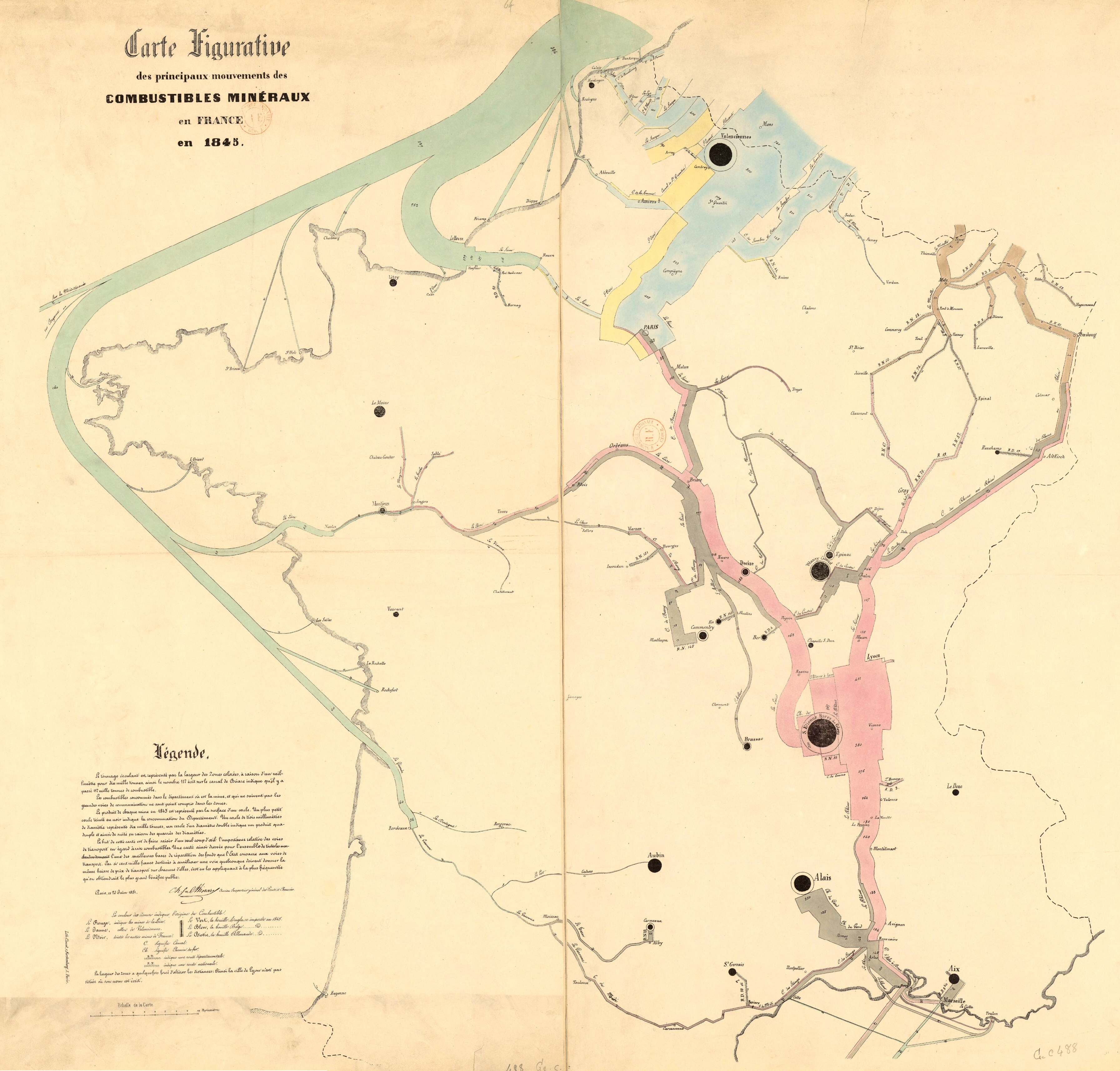 Auteur : Minard, Charles-Joseph (1781-1870) Éditeur : imp. de Clouet (Paris) Date d'édition : 1851 Sujet : Combustibles Droits : domaine public Identifiant : ark:/12148/btv1b530230483 Source : Bibliothèque nationale de France